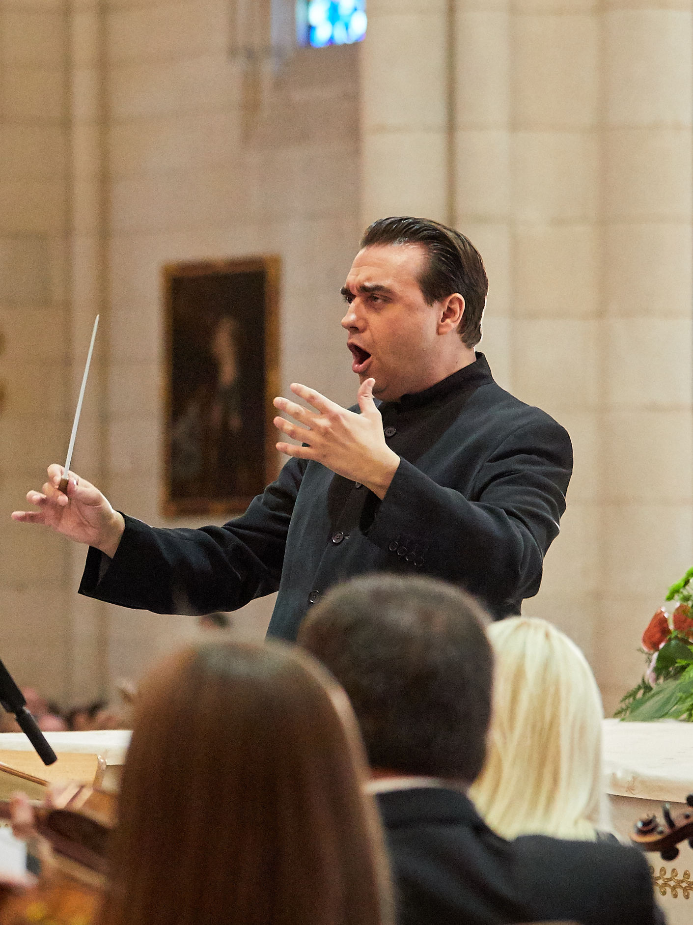 Concierto de Plácido Domingo con motivo del Año Jubilar Mariano (7-06-2019) Firma: Archimadrid / Ignacio Arregui García